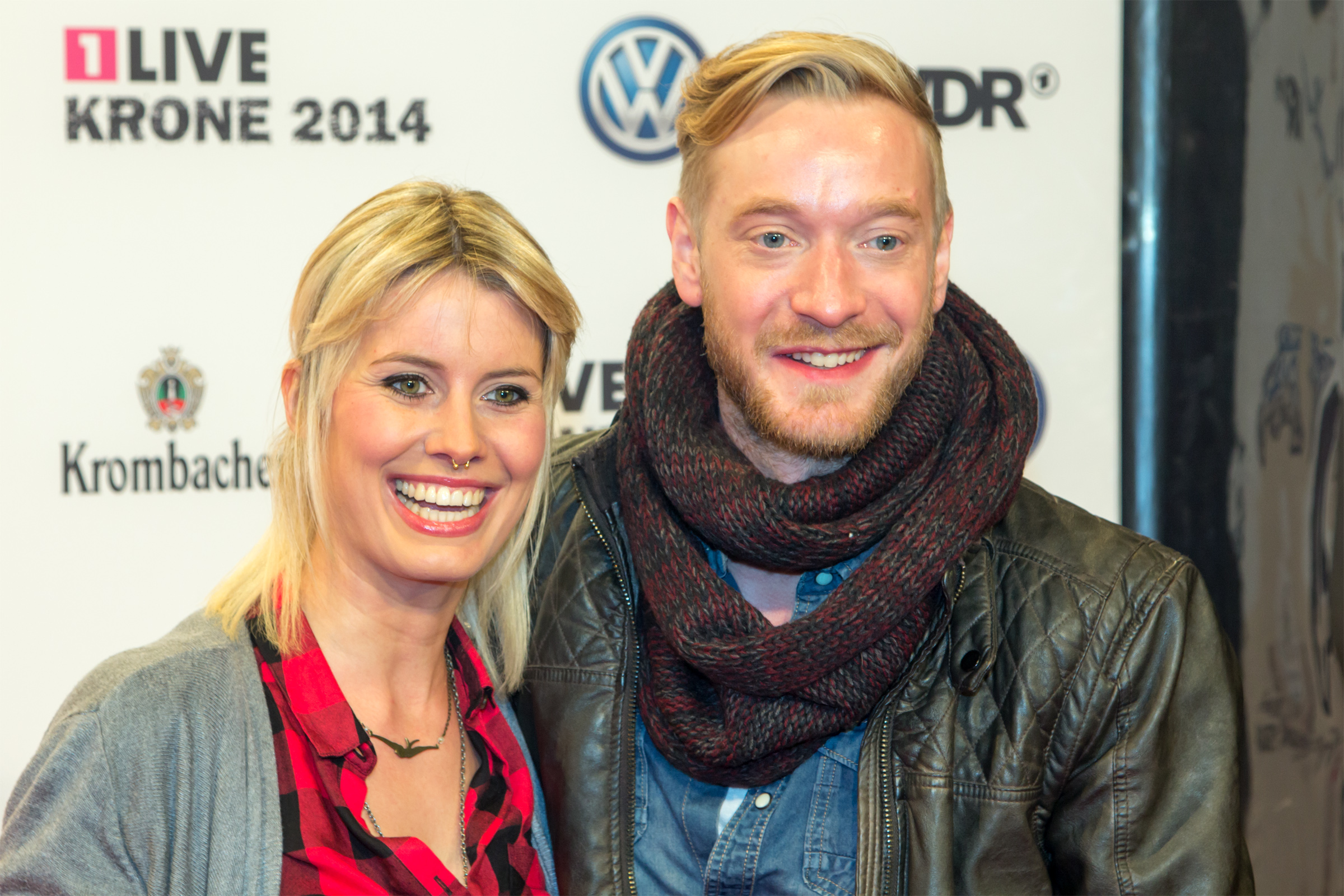 1LIVE Krone 2014 in der Bochumer Jahrhunderthalle: Pia Tillmann und Steffen Donsbach auf dem roten Teppich